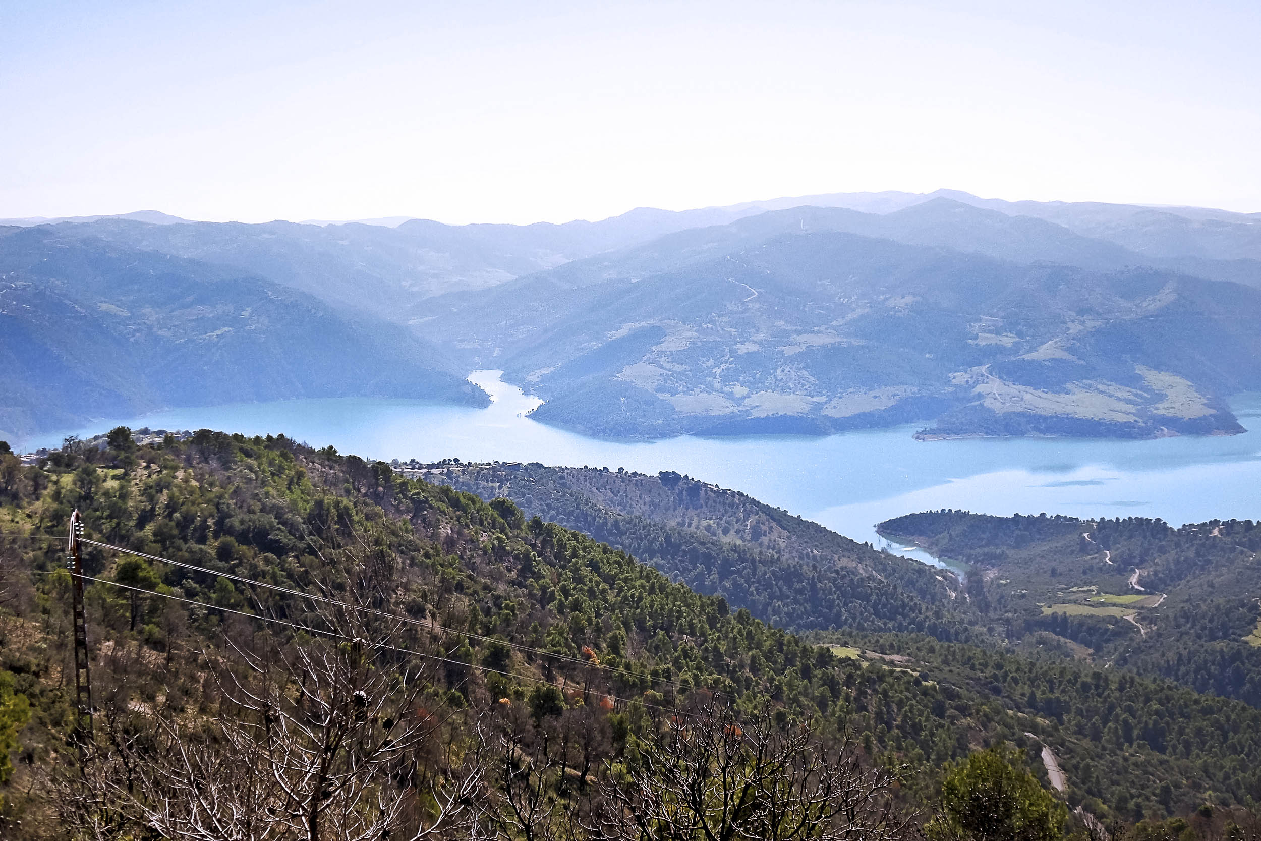 Maala, daira de Lakhdaria, wilaya de Bouira معالة، دائرة الاخضرية، ولاية البويرة